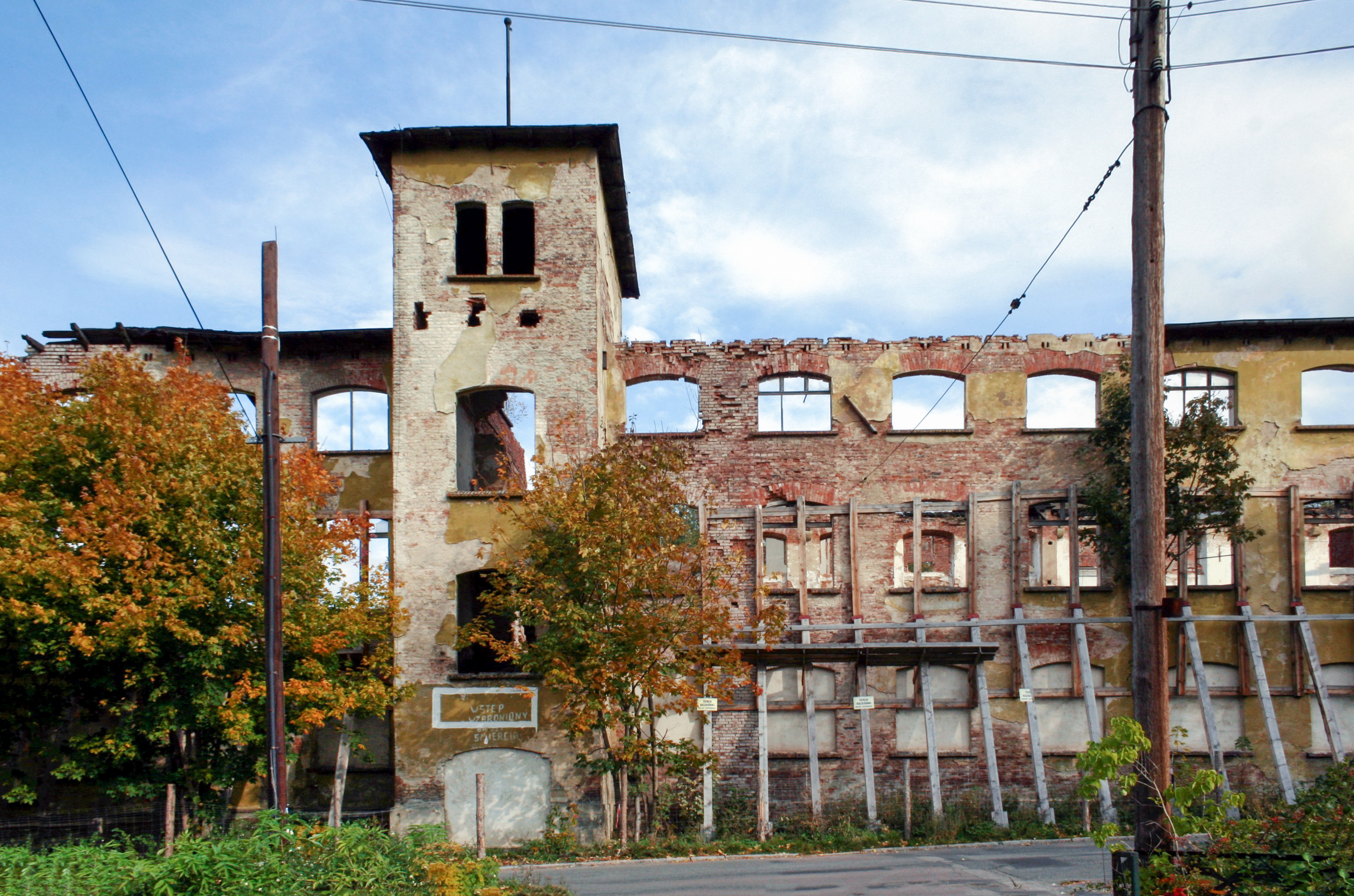 Ruina budynku Zakładu Przemysłu Włókienniczego w Walimiu